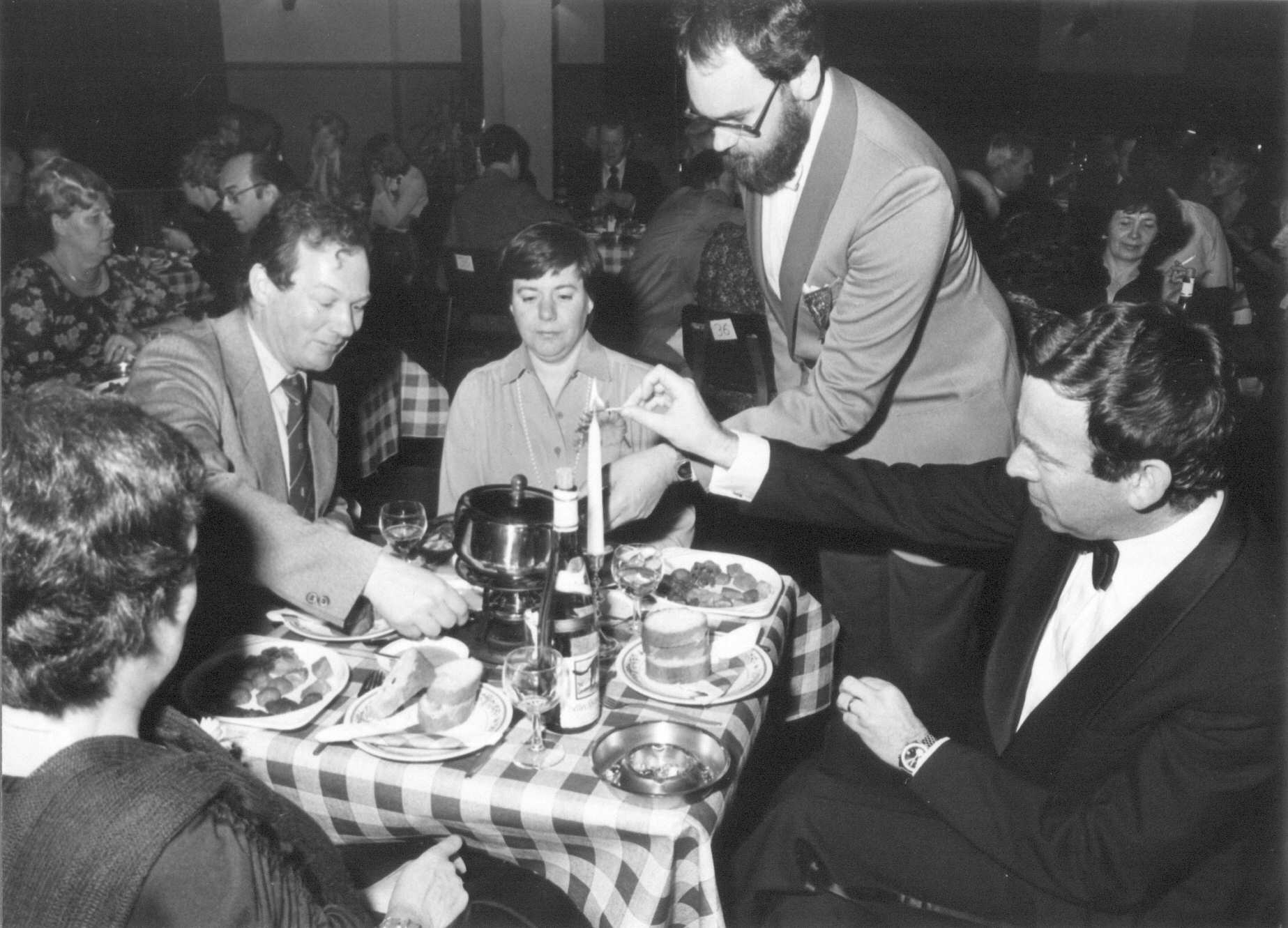 Wethouder H.Bergamin(links) en kamerlid A.Lansink met hun echtgenoten bijeen tijdens een fondue-avond van de Carnavalsvereniging "'t Geberste Kruukske" maart 1979